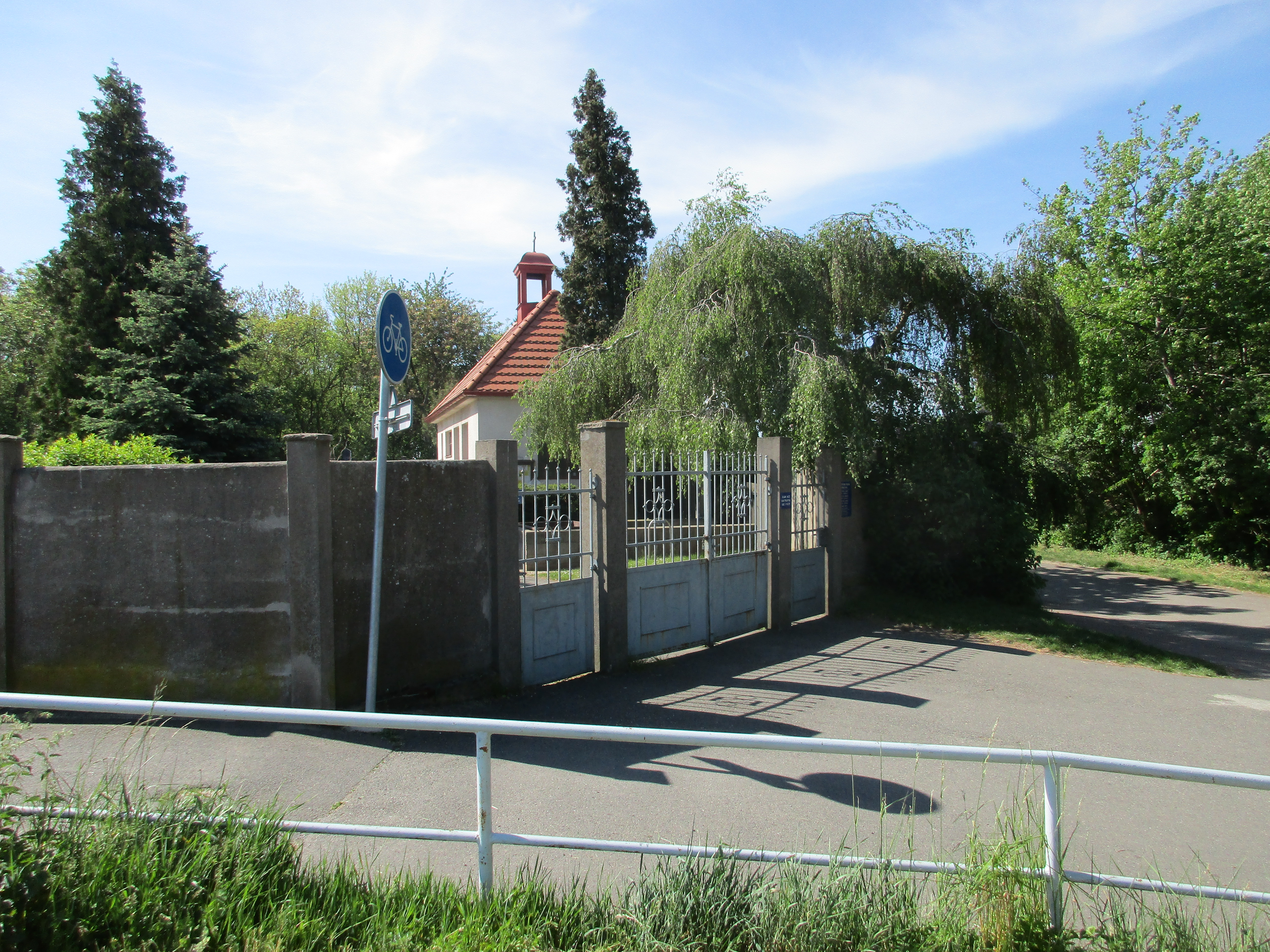 Hřbitov Horní Počernice, ulice K Berance.